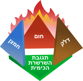 פירמידת האש